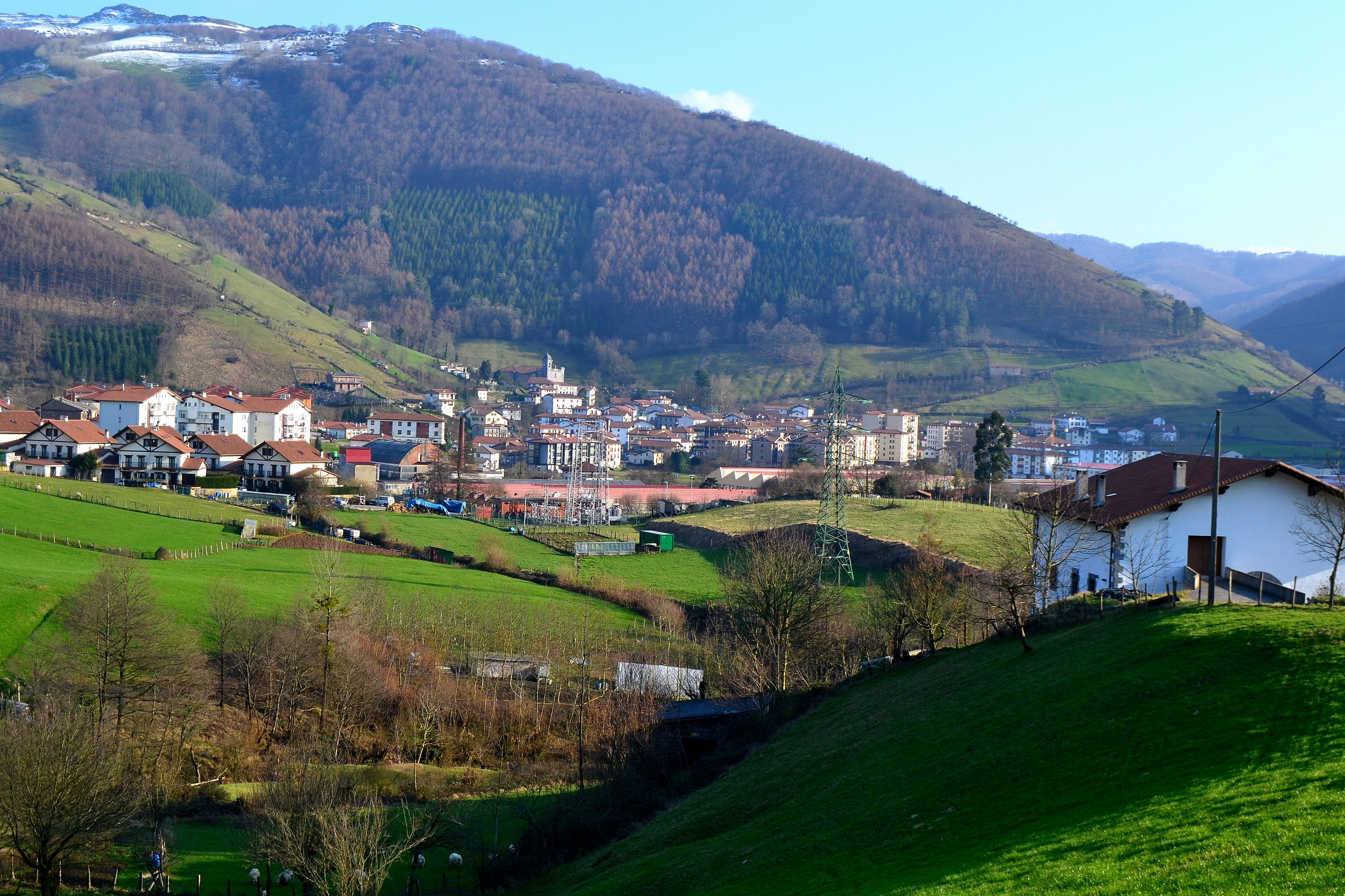 Leitza, Nafarroa. Euskal Herria. Leitza, Navarre. Basque Country.